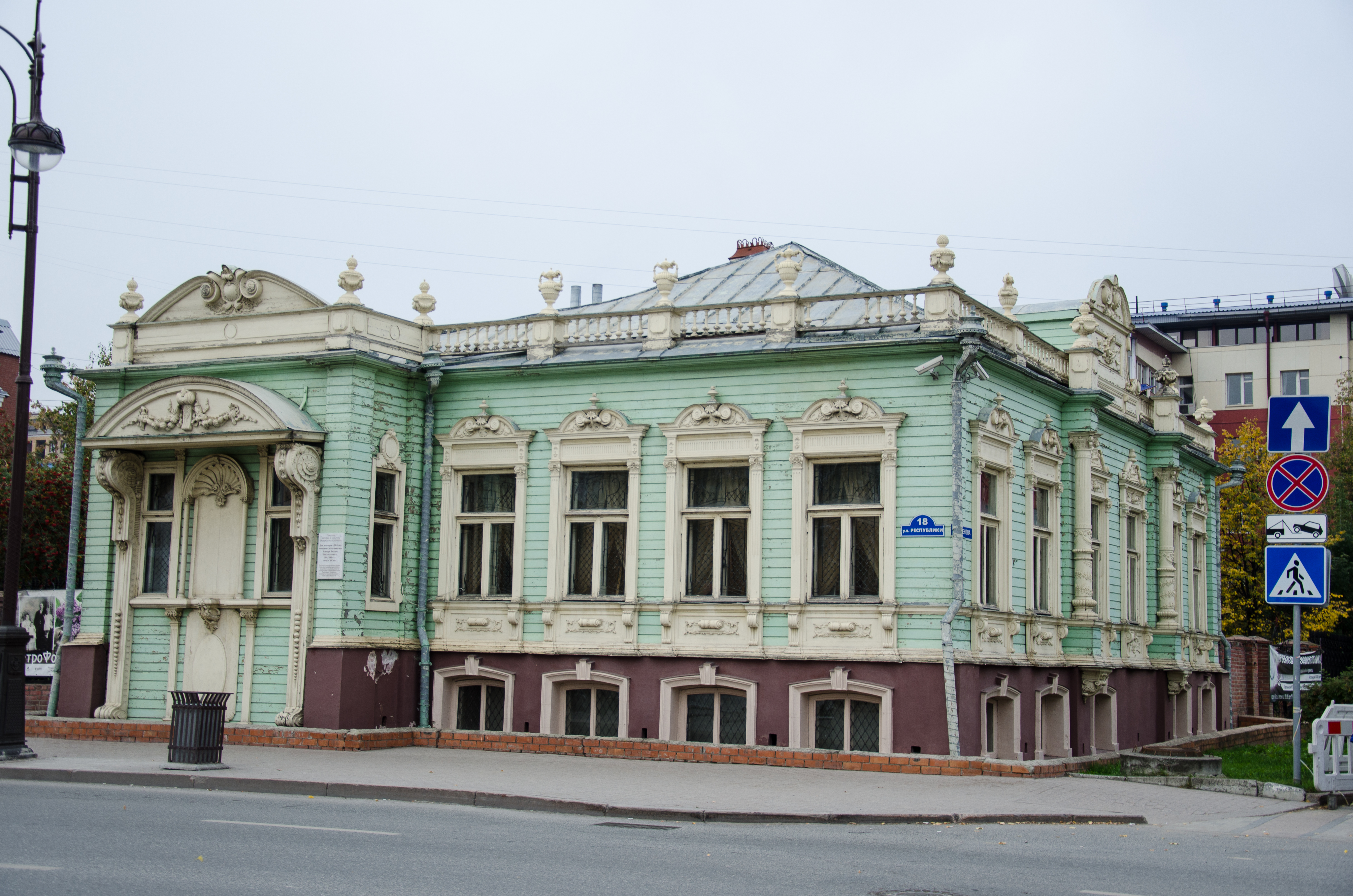 Дом, в котором в 1919 году находилась штаб-квартира Блюхера Василия Константиновича: улица Республики, 18, Тюмень, Тюменская область